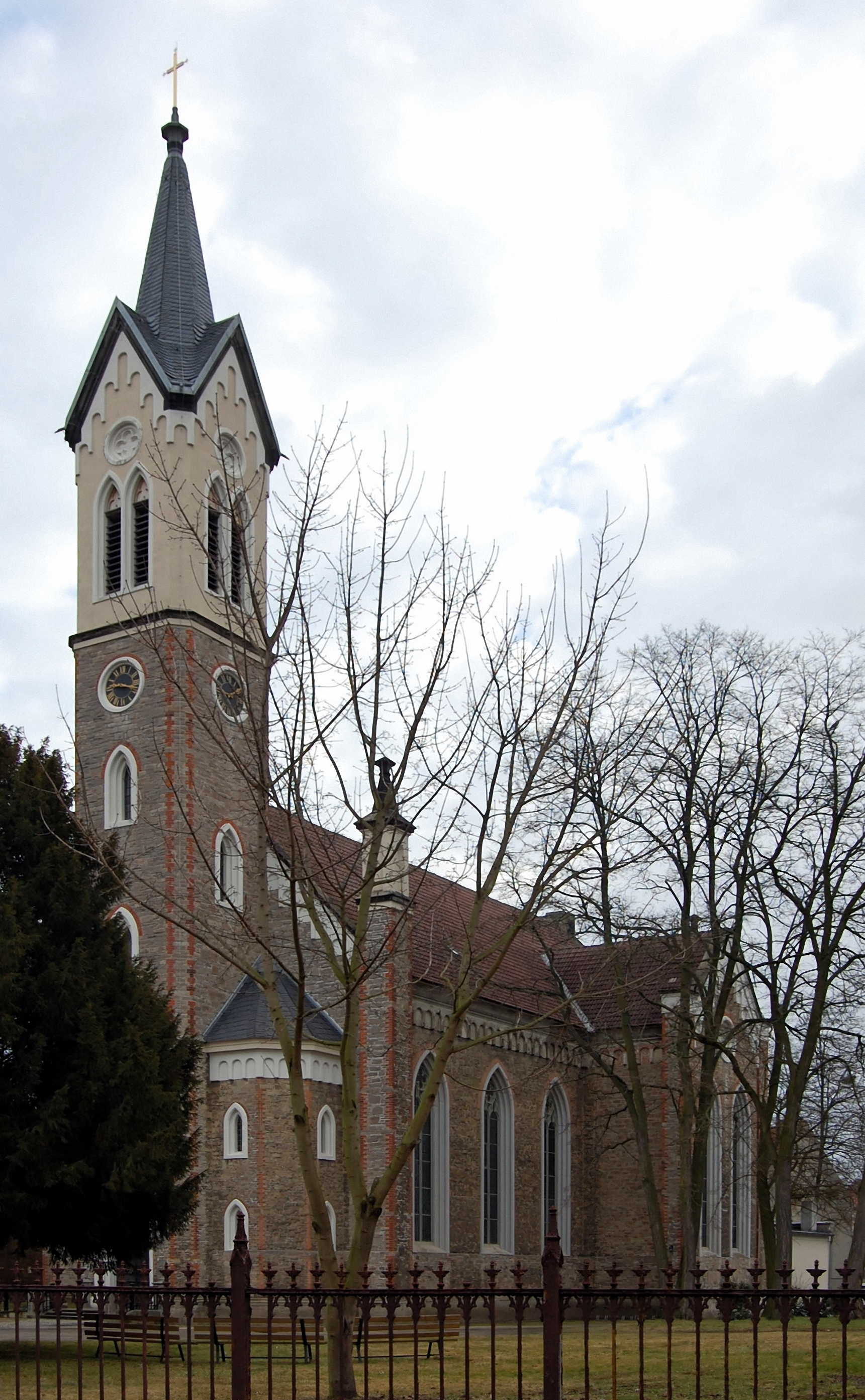 Sankt-Marien-Kirche Rosslau